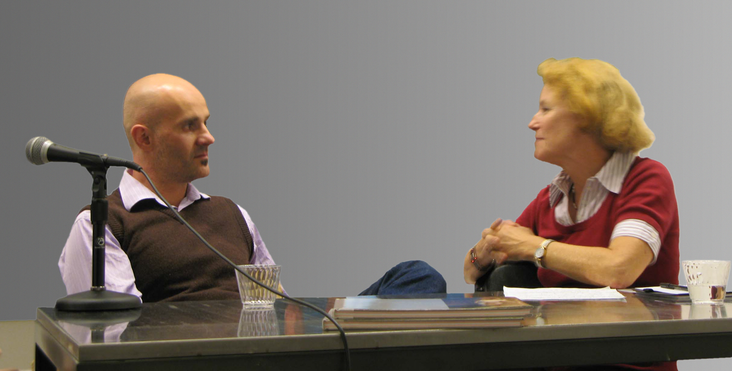 Aris Kalaizis und Carol Strickland während eines Künstlergespräches in der Moti Hasson Gallery, New York